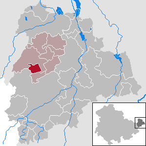 Mehna in Thuringia - District Altenburger Land